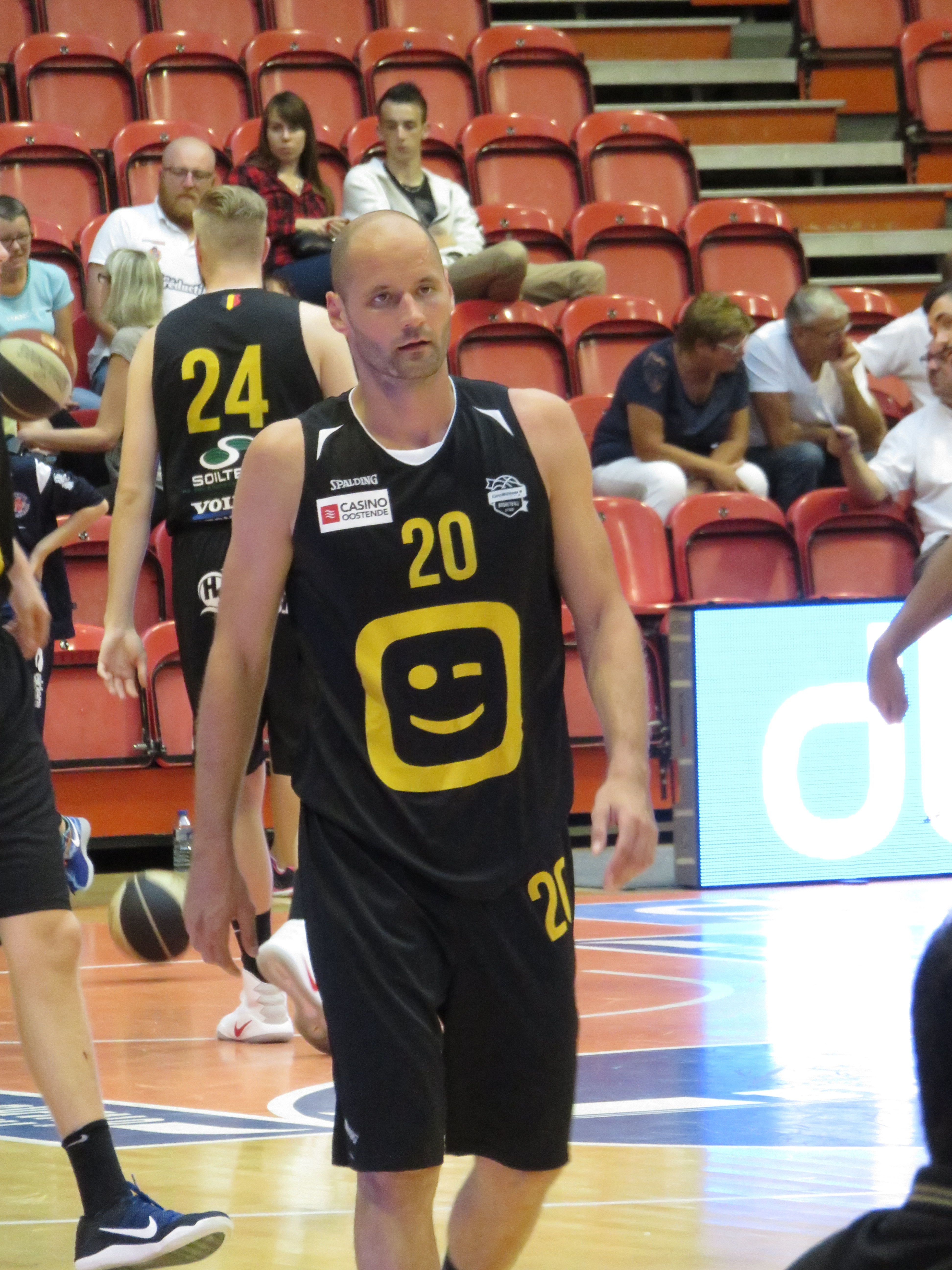 20 Dušan Đorđević